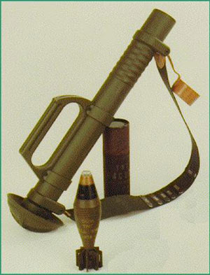 Mortaio Hirtenberg da 60mm, Esercito Italiano